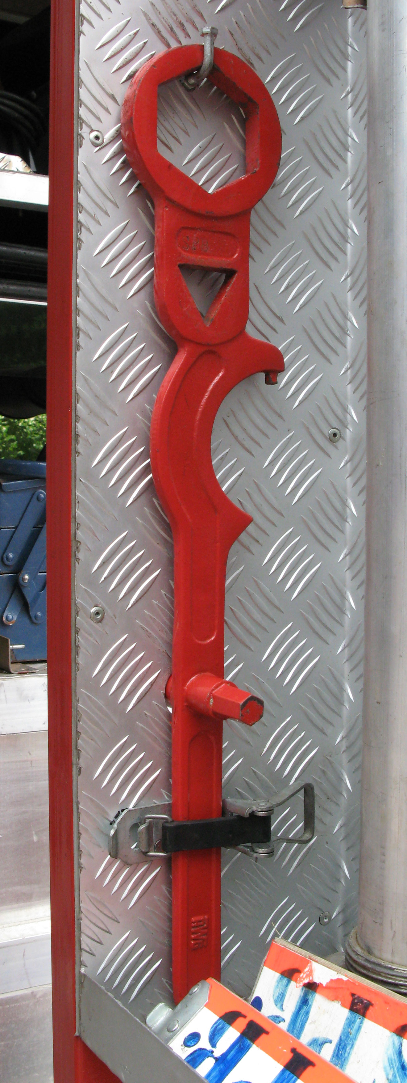 Hydranteschlëssel.